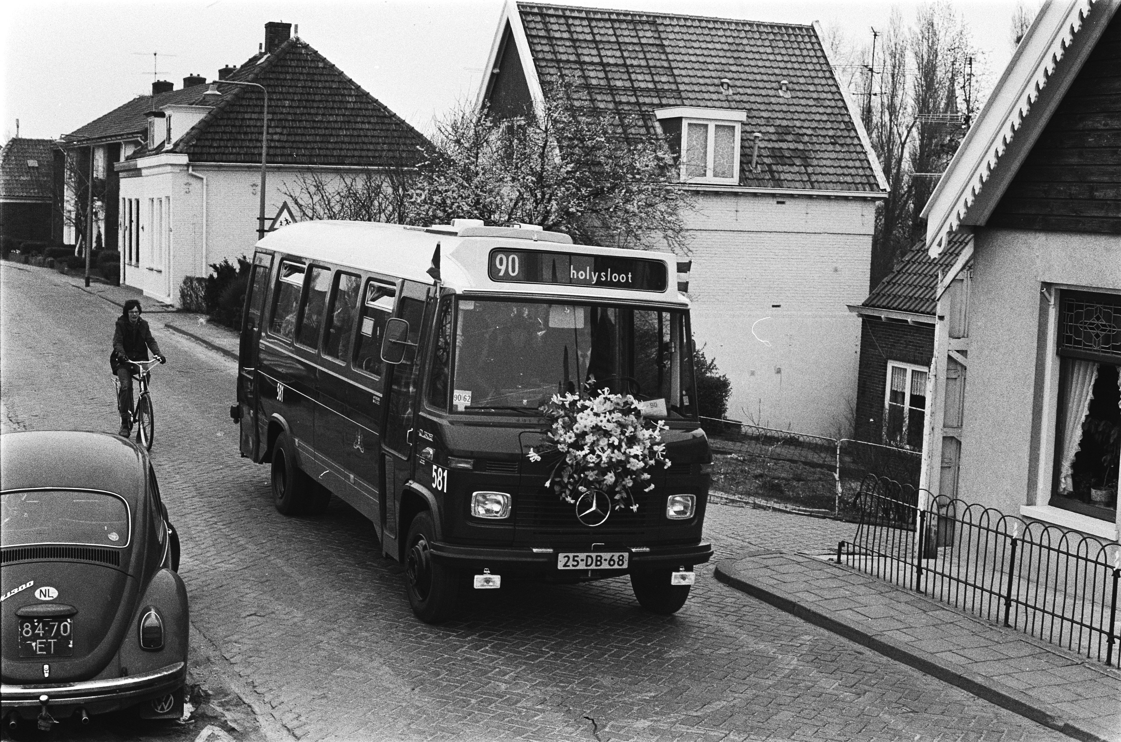 Collectie / Archief : Fotocollectie Anefo Reportage / Serie : [ onbekend ] Beschrijving : GVB-Amsterdam start met micro-bus Datum : 8 april 1978 Fotograaf : Verhoeff, Bert / Anefo Auteursrechthebbende : Nationaal Archief Materiaalsoort : Negatief (zwart/wit) Nummer archiefinventaris : bekijk toegang 2.24.01.05 Bestanddeelnummer : 929-6621